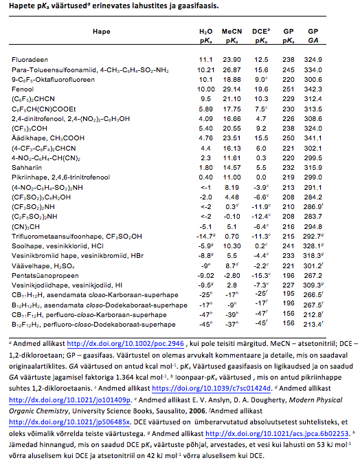 Andmed allikast , kui pole teisiti märgitud. MeCN – atsetonitriil; DCE – 1,2-dikloroetaan; GP – gaasifaas. Väärtustel on olemas arvukalt kommentaare ja detaile, mis on saadaval originaalartiklites. GA väärtused on antud kcal mol-1. pKa Väärtused gaasifaasis on ligikaudsed ja on saadud GA väärtuste jagamisel faktoriga 1.364 kcal mol-1. b Ioonpaar-pKa väärtused , mis on antud pikriinhappe suhtes 1,2-dikloroetaanis. c Andmed allikast d Andmed allikast e Andmed allikast E. V. Anslyn, D. A. Dougherty, Modern Physical Organic Chemistry, University Science Books, Sausalito, 2006. fAndmed allikast DCE väärtused on ümberarvutatud absoluutsetest suhtelisteks, et oleks võimalik võrrelda teiste väärtustega. g Andmed allikast h Jämedad hinnangud, mis on saadud DCE pKa väärtuste põhjal, arvestades, et vesi kui lahusti on 53 kJ mol-1 võrra aluselisem kui DCE ja atsetonitriil on 42 kJ mol-1 võrra aluselisem kui DCE.